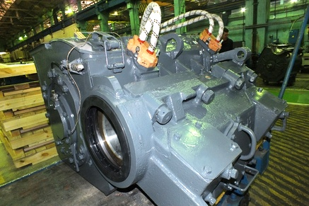 Тяговый электродвигатель ДТК-417Ц